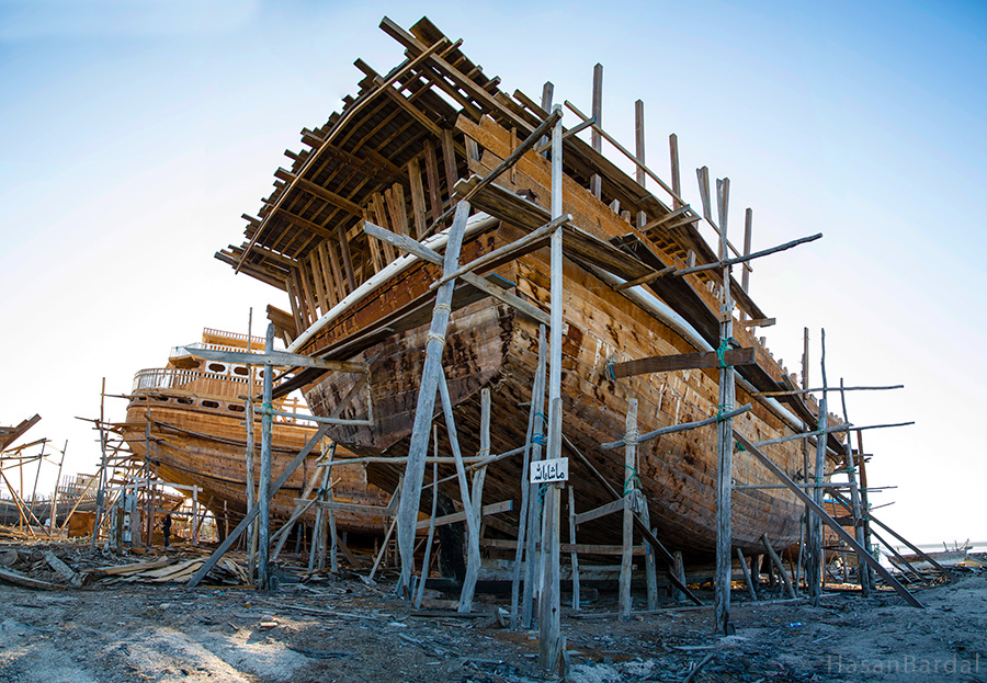 کارگاه لنج‌سازی در بندر گوران، جزیره قشم